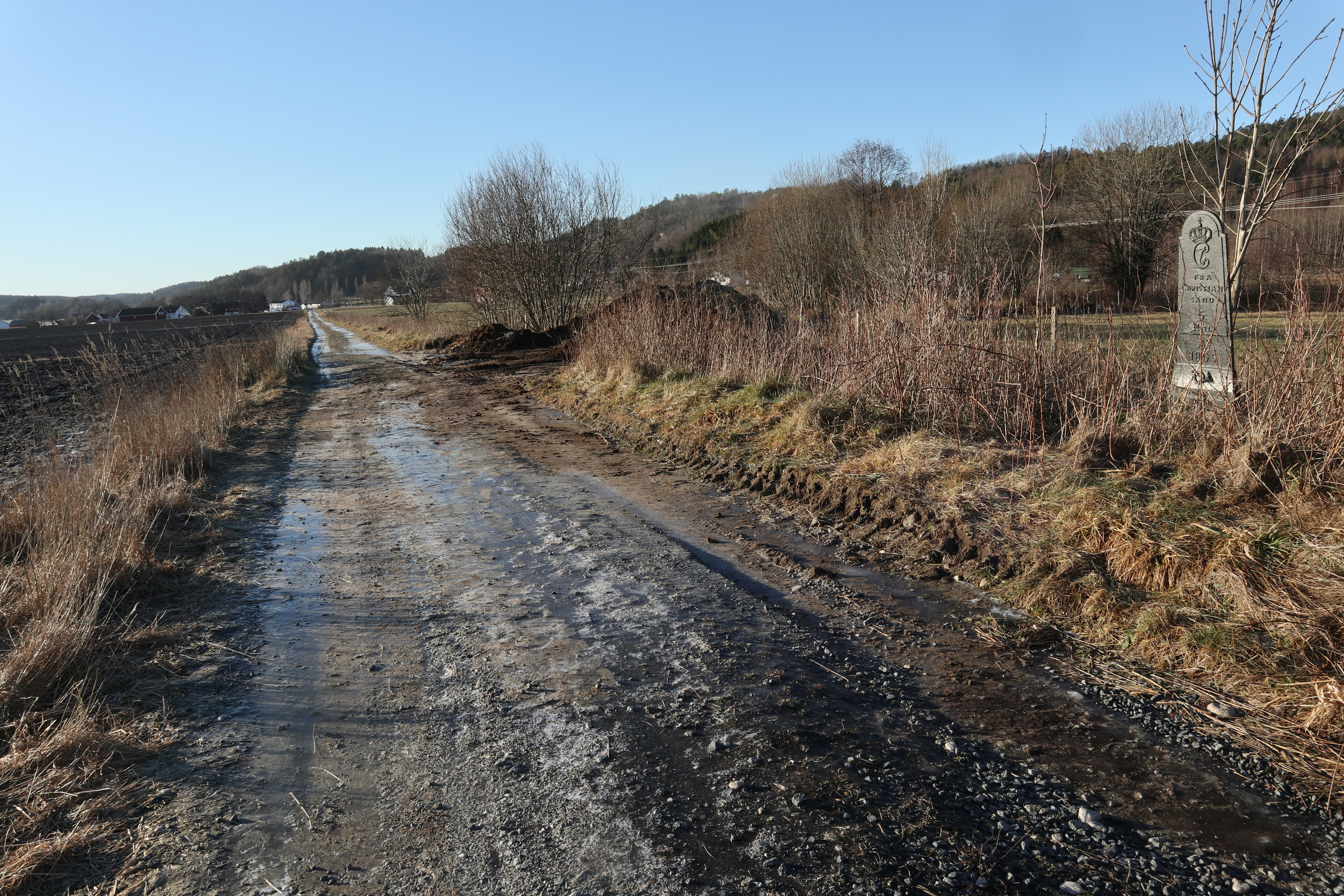 Vei med grusdekke gjennom åkerlandskap milepæl th